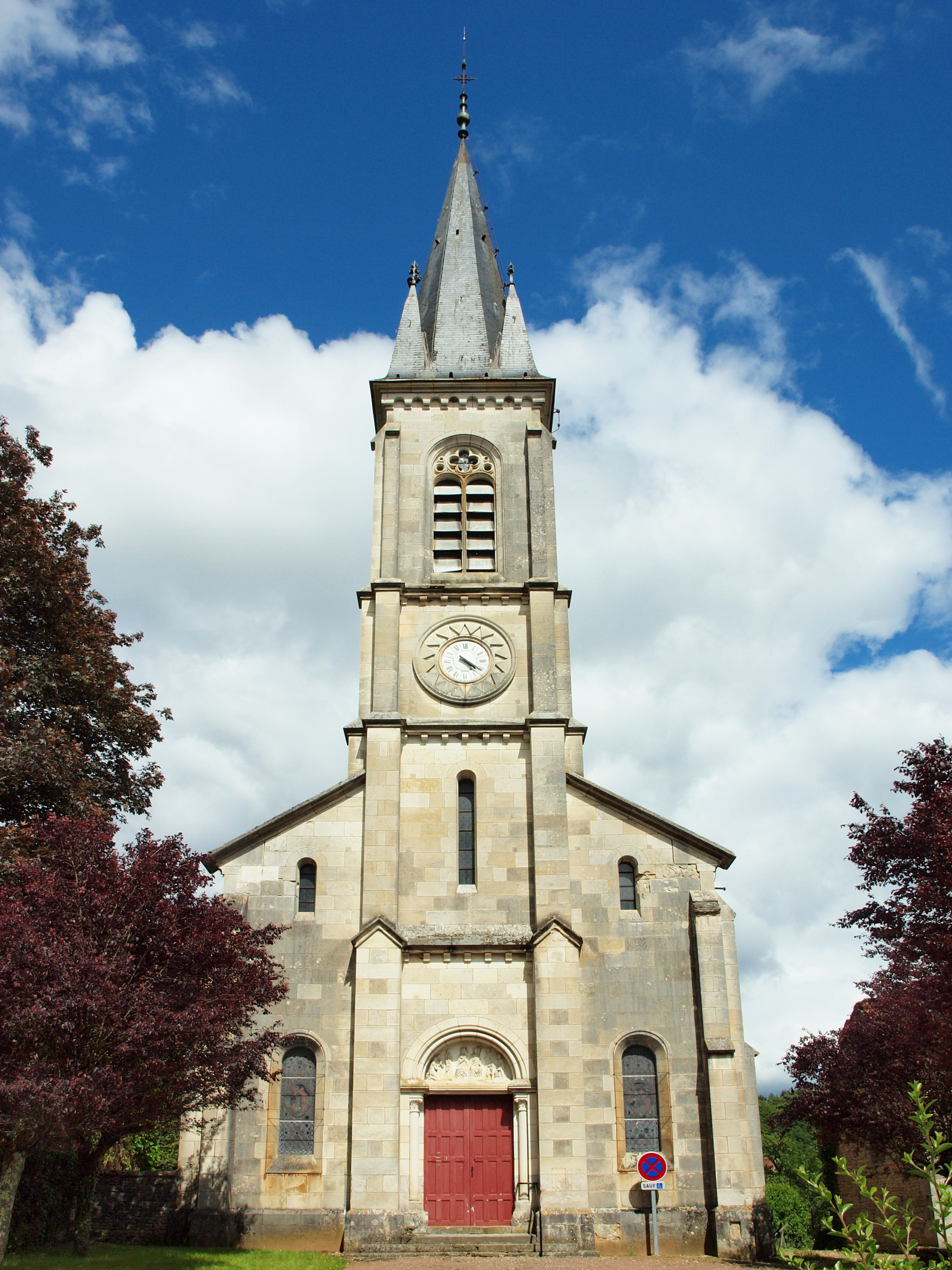 Chamoux (Yonne, France)